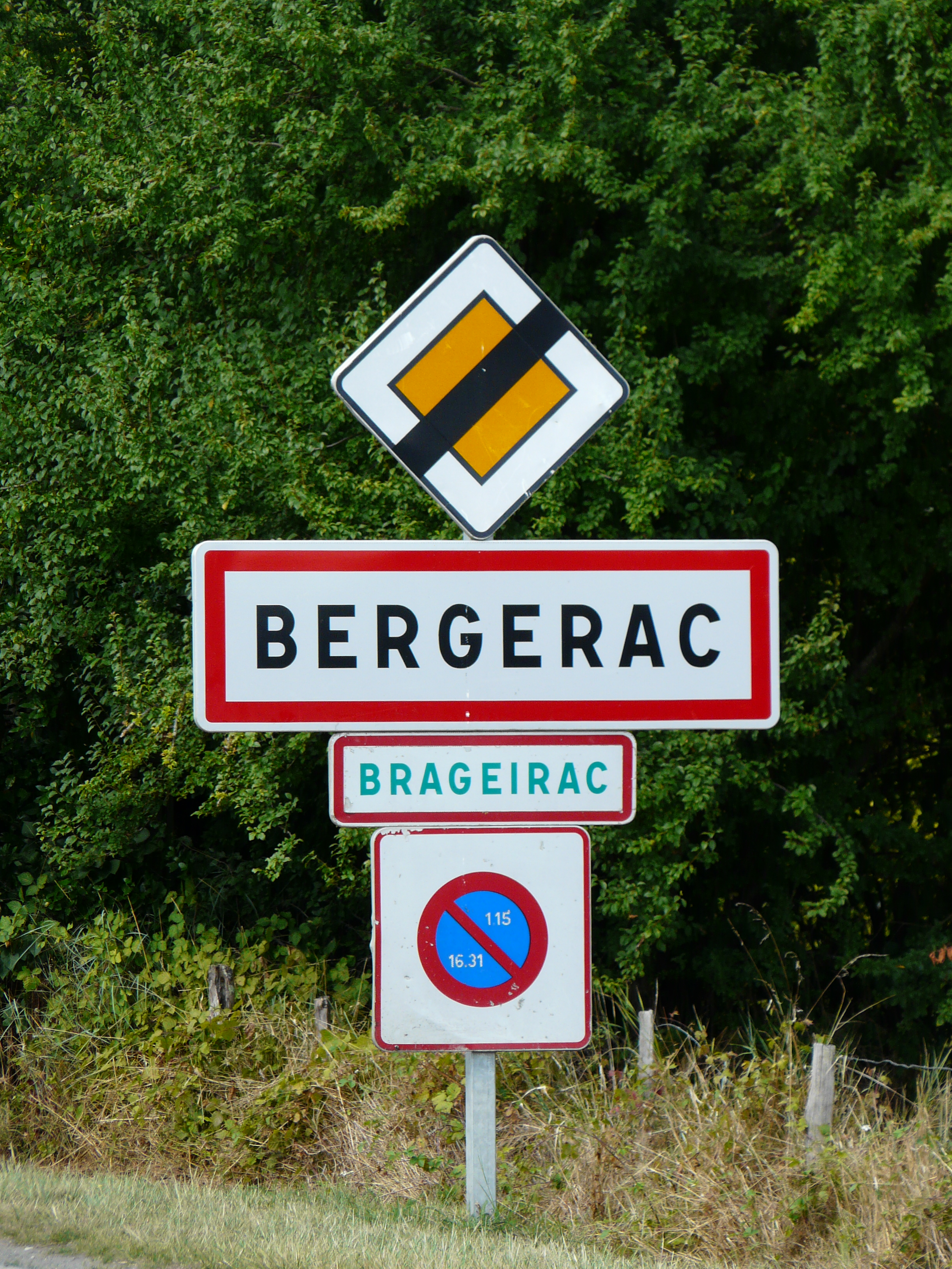 Panneau d'entrée de ville en français et occitan, Bergerac, Dordogne, France.